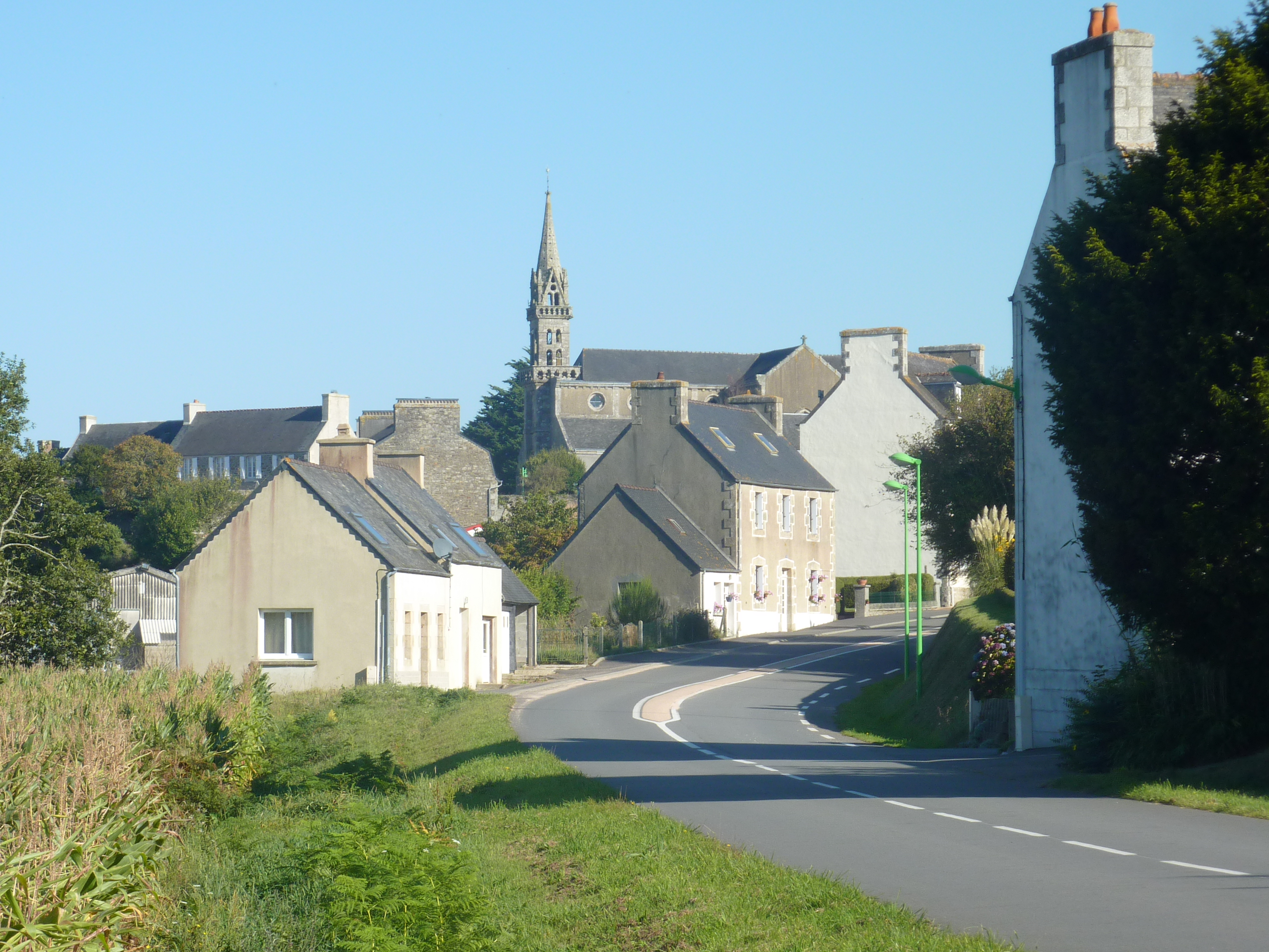 Botsorhel : le bourg vu du sud (carrefour routes de Plouigneau et de Lannéanou)